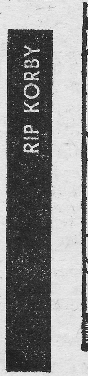 Vertikale Rip-Korby-Kopfzeile mit Titel (seitlich links) zu einem Comicstrip in der Neuen Kronen Zeitung